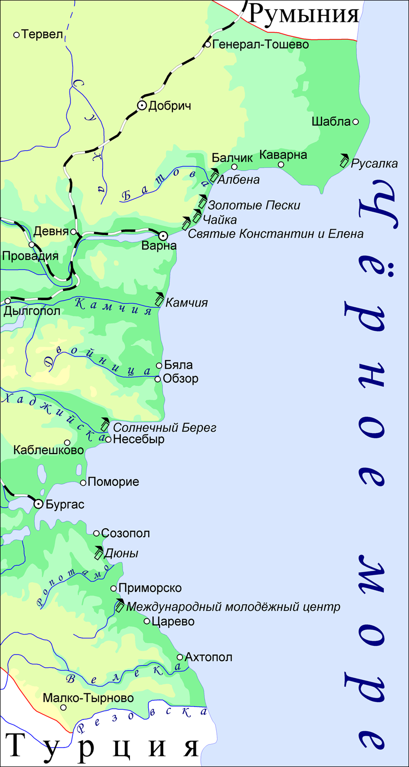 'карта Черноморского побережья Болгарии